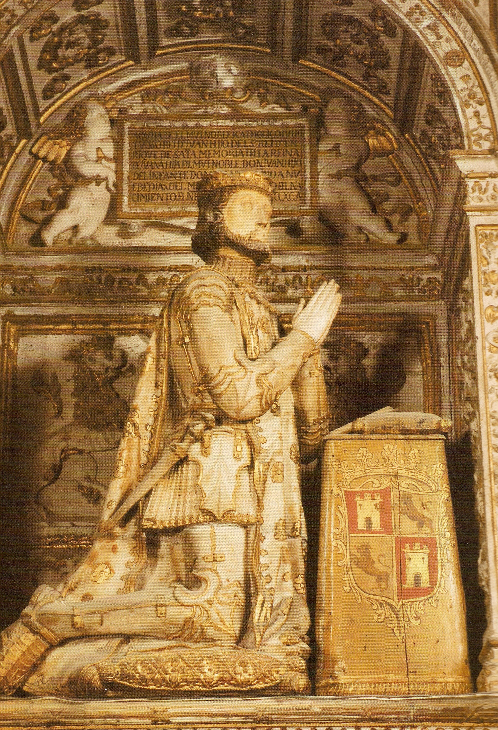 Sepulcro del rey Juan I de Castilla (1358-1390). Se encuentra en la capilla de los Reyes Nuevos de la catedral de Toledo.